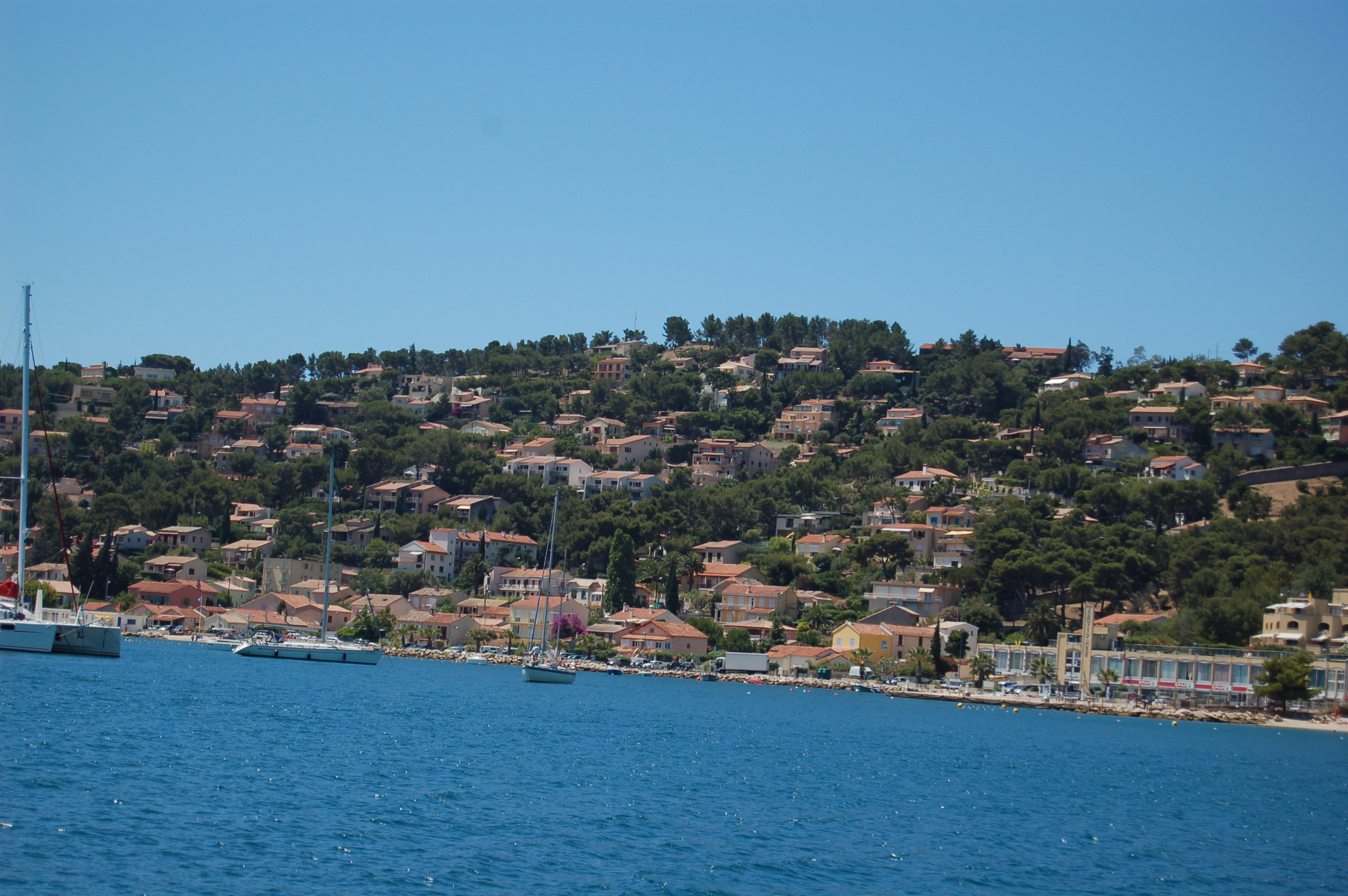 Vue de Saint Mandrier (83) depuis la navette bateau